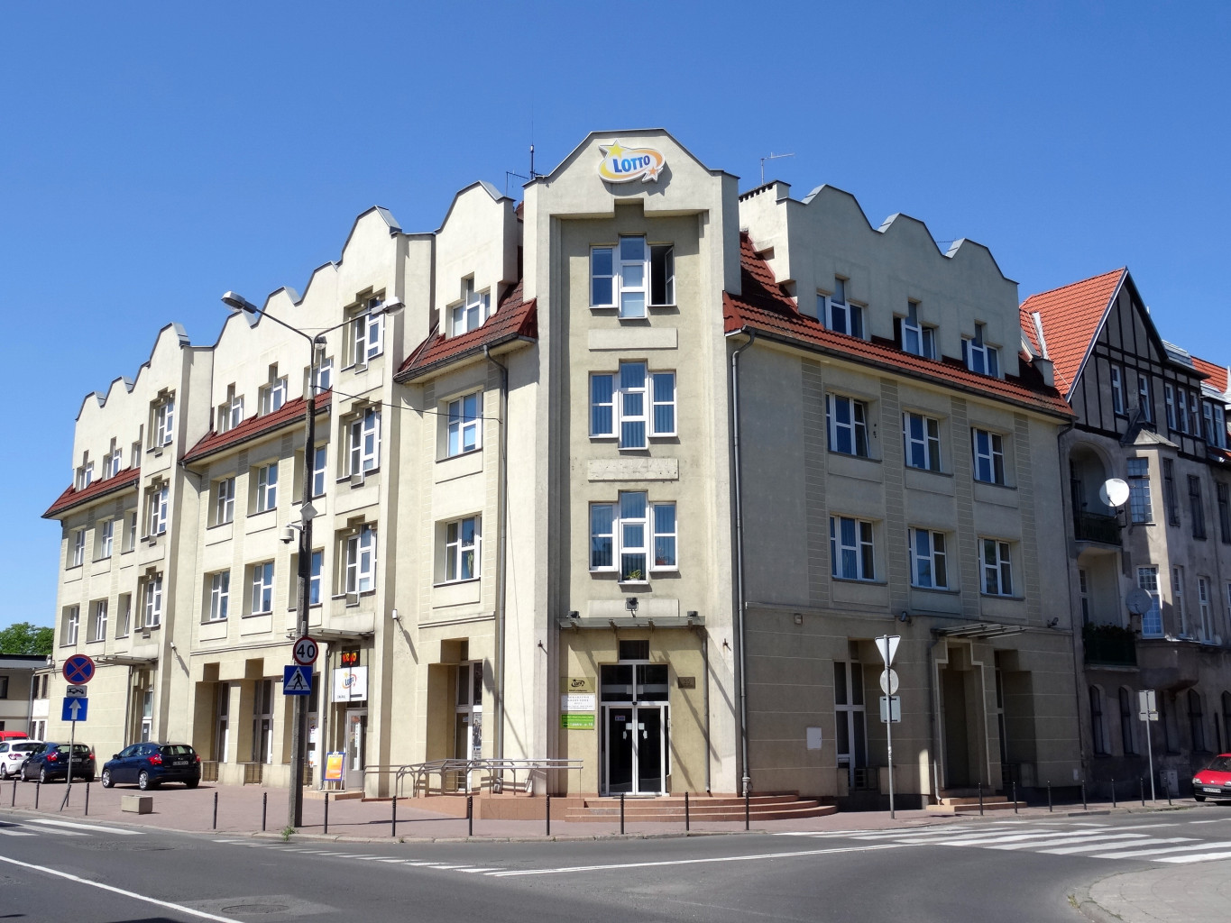 Siedziba oddziału wojewódzkiego Totalizatora Sportowego, ul. Poznańska 20 w Bydgoszczy